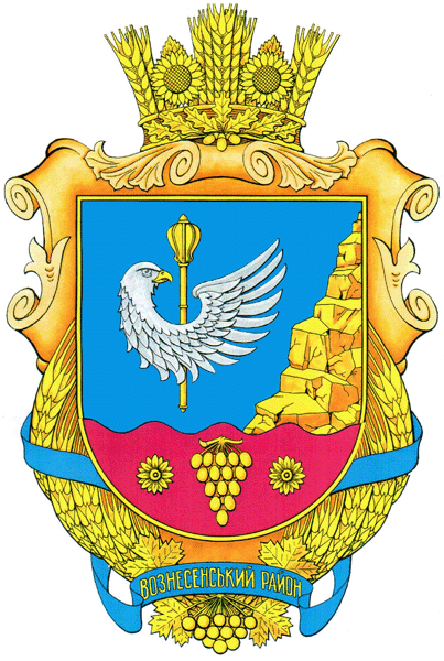 Герб Вознесенського району